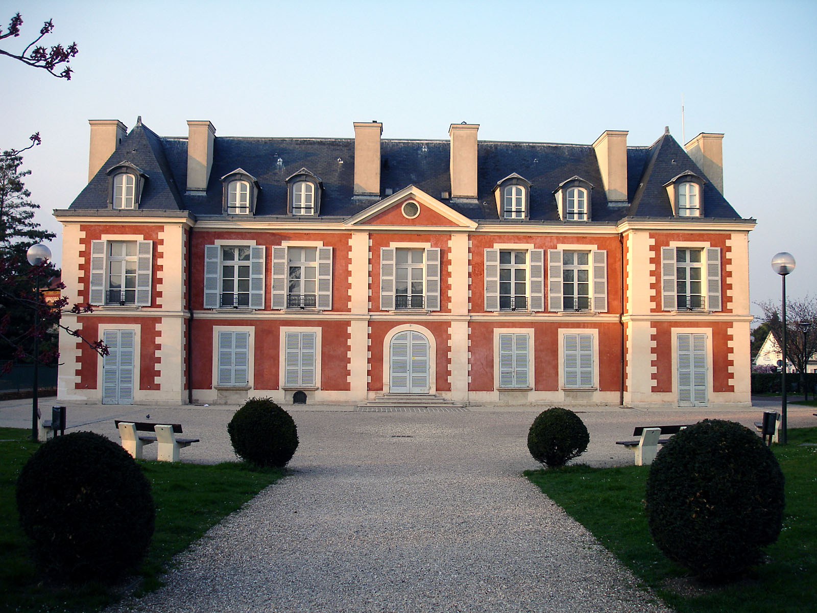 Le château du maréchal de Catinat à Saint-Gratien, Val-d'Oise, France.